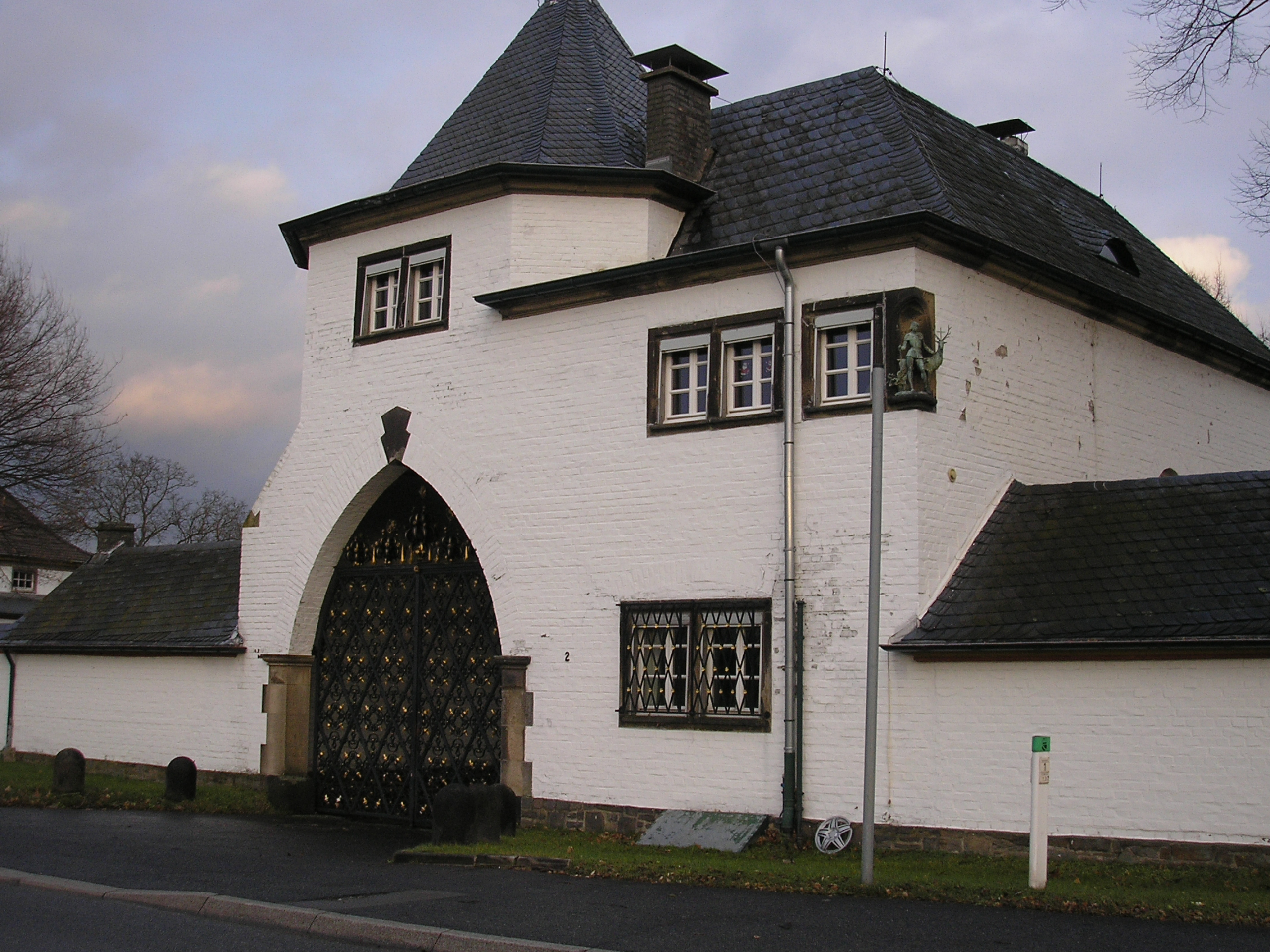 Nebentor des Gestüt Röttgen.